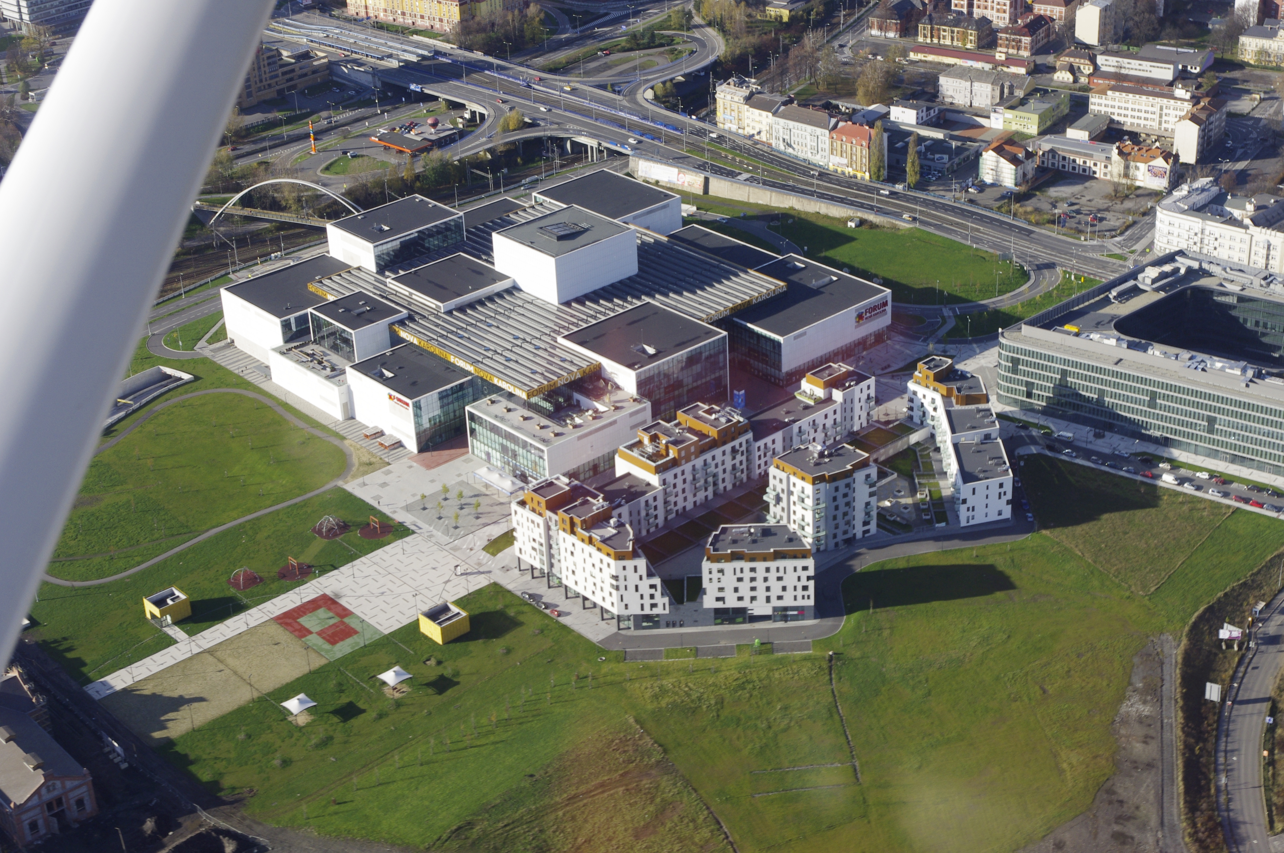 Letecký pohled na Karolinu